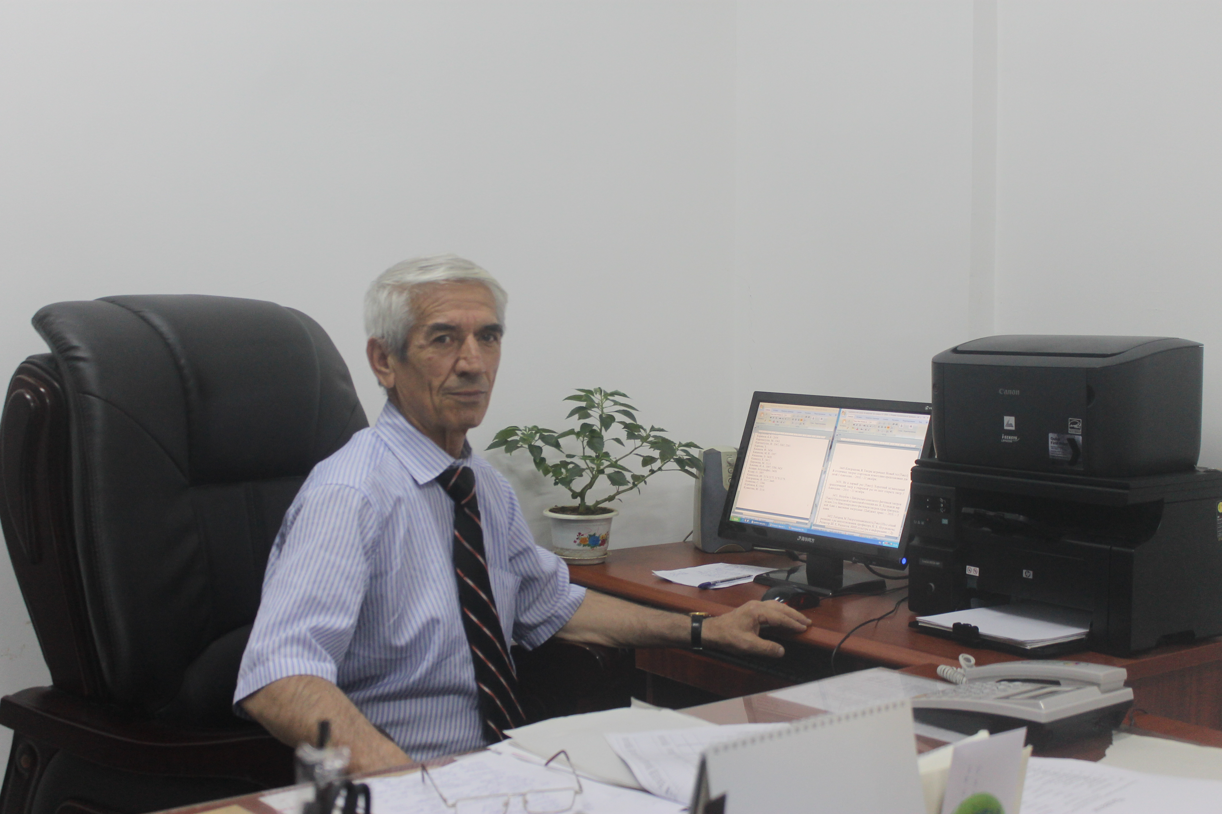 Джурабой Раджабов Отличник раб культуры РТ